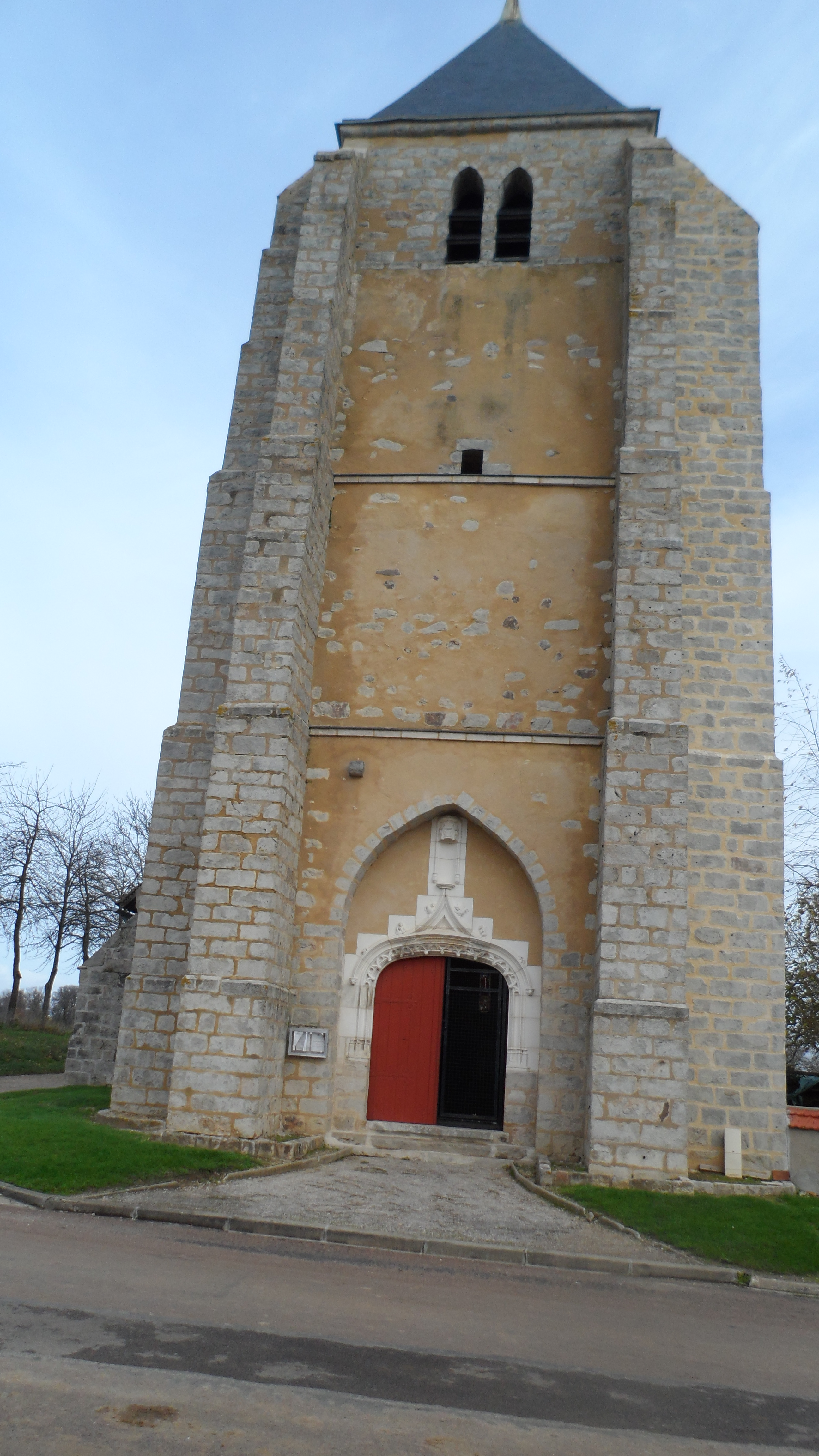 Eglise Saint-Loup-d'Ordon (Yonne) France des XIII et XV eme siècle